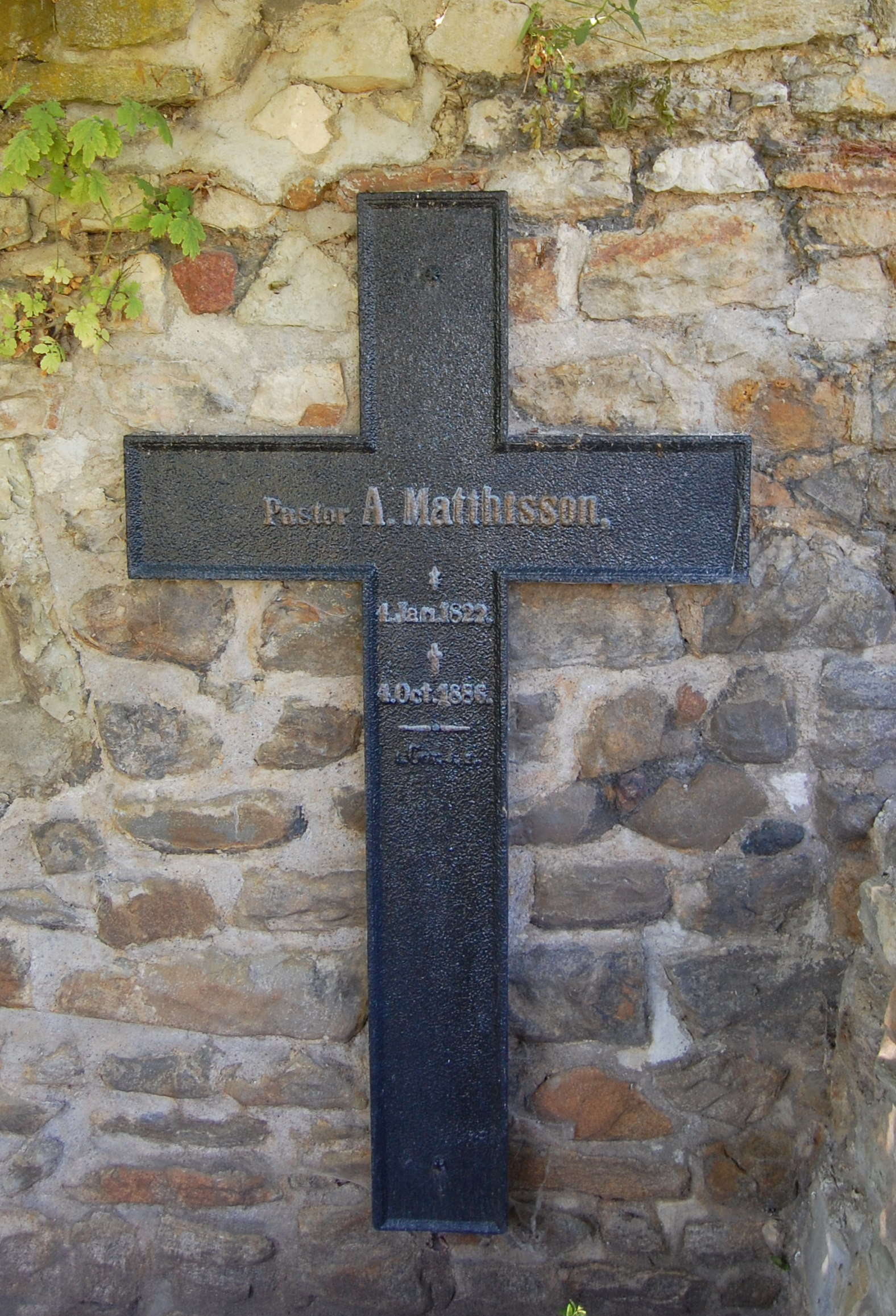 Kreuz für den Pastor Matthisson an der Sankt-Stephanus-Kirche in Magdeburg-Westerhüsen